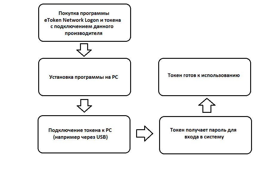 Блок схема